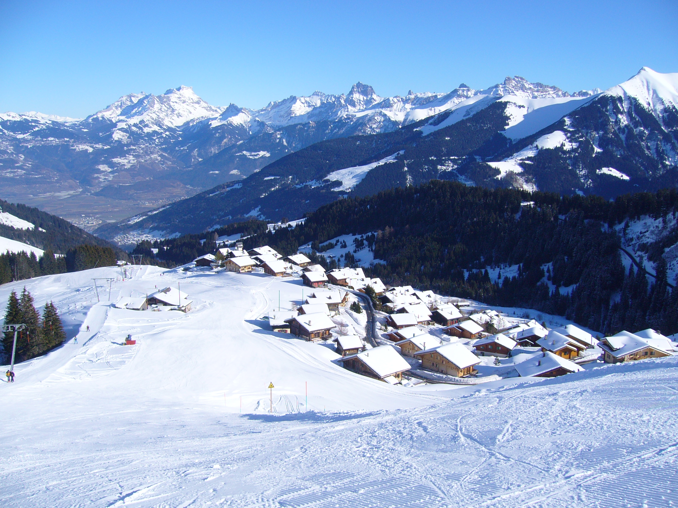 Champoussin, Valais